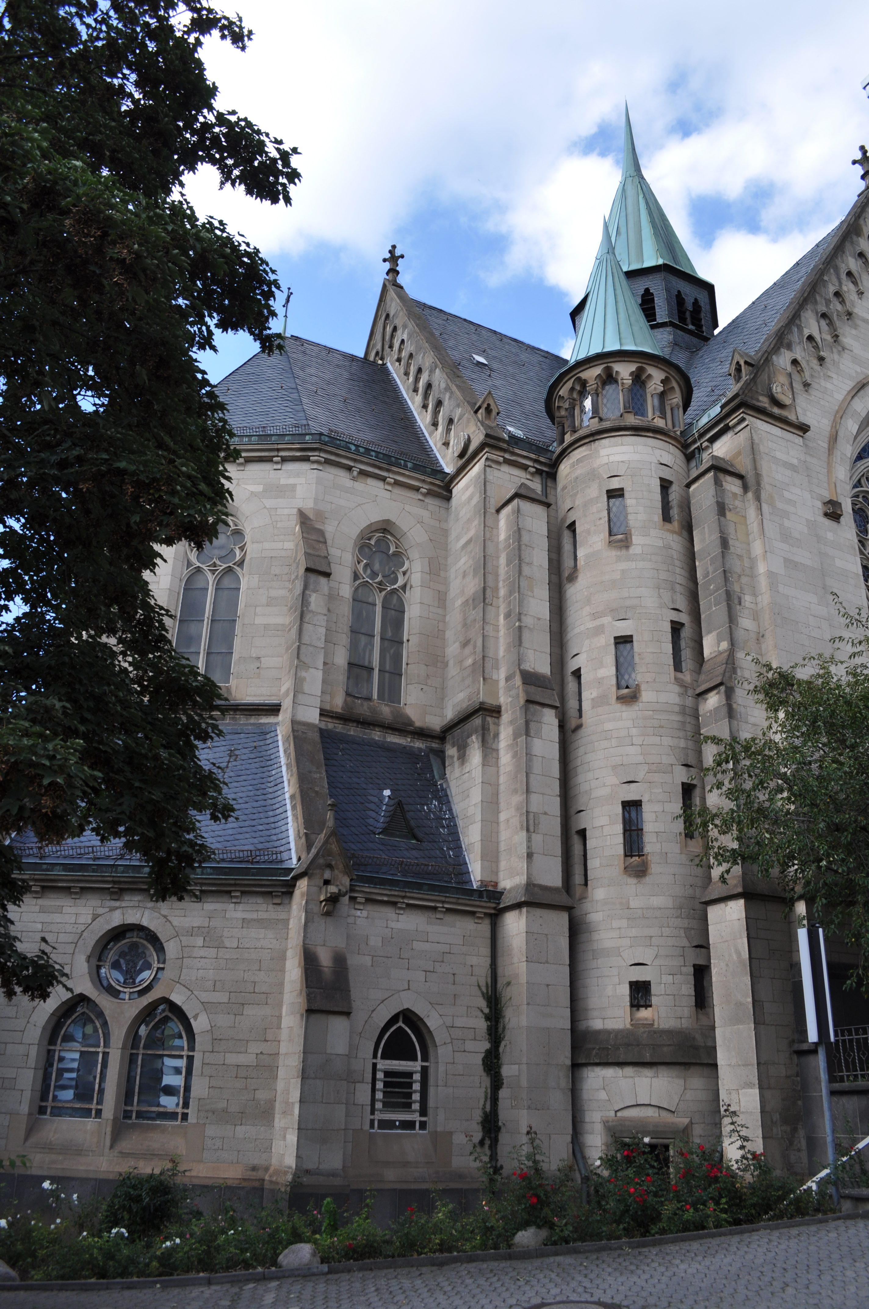 Seitenansicht der Kirche St. Marien (Bad Homburg vor der Höhe), linke Seite